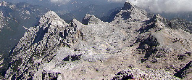 Kotel - nekdanje dno Triglavskega ledenika